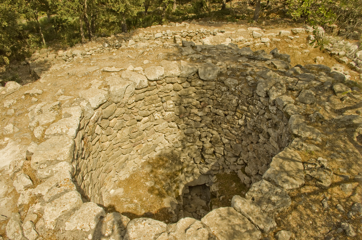 Vista superior del talaiot central del Poblat talaiòtic de Ses Psaïsses